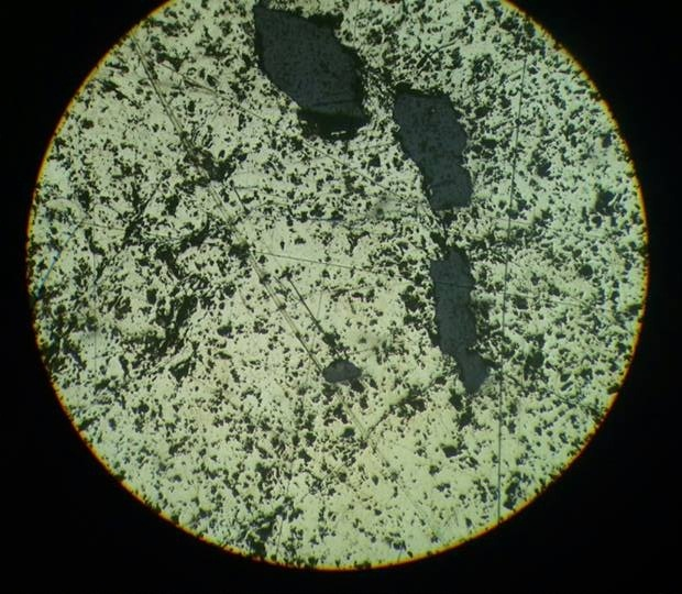 Chalcopyrite under polarized light by petrographic microscope